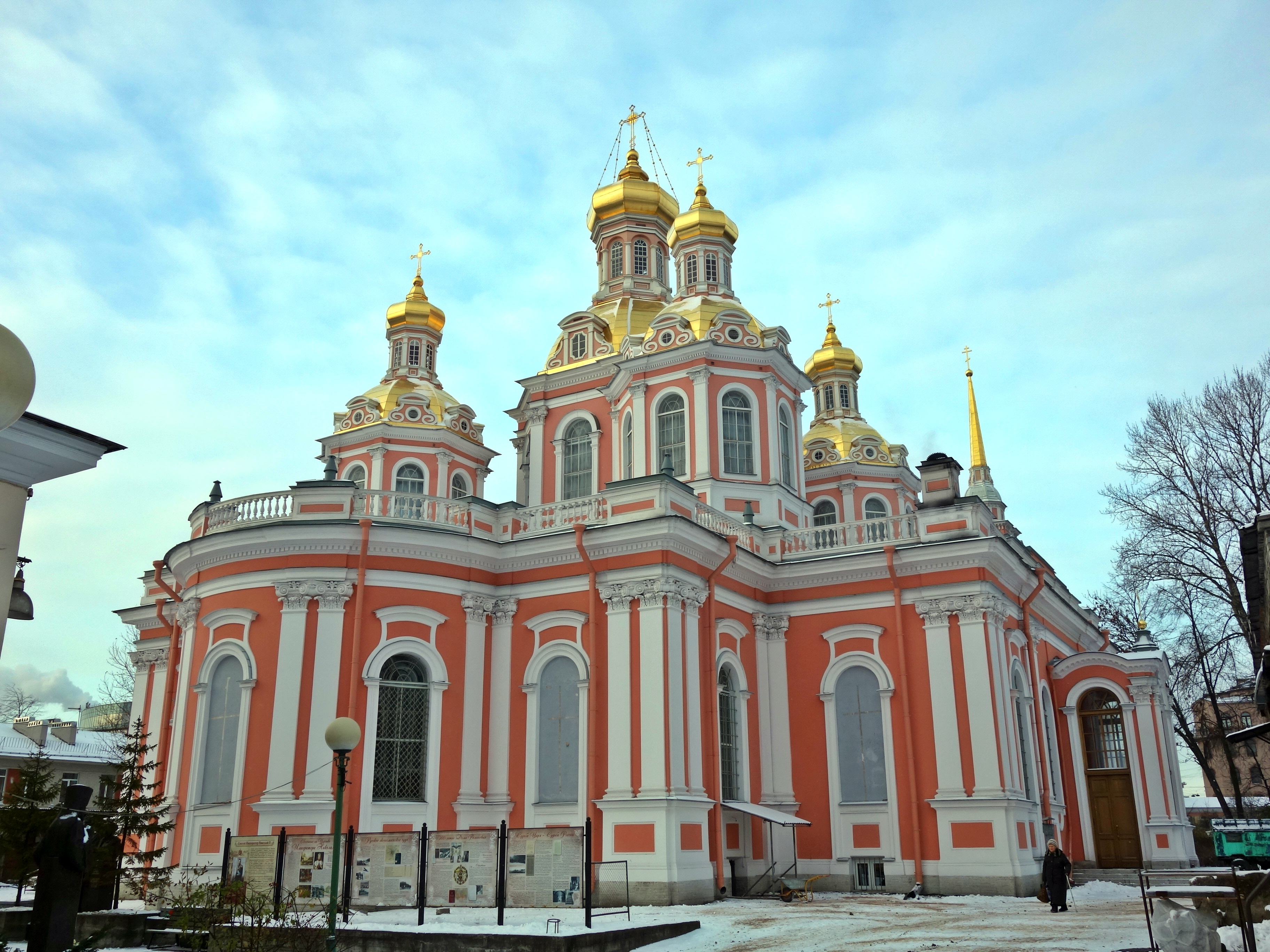 Крестовоздвиженский казачий собор: Лиговский проспект, 128, Центральный район, Санкт-Петербург Архитекторы: И.Я. Шумахер, И.Е. Диммерт Построен в 1747—1749 гг., перестроен в 1848—1851 гг.